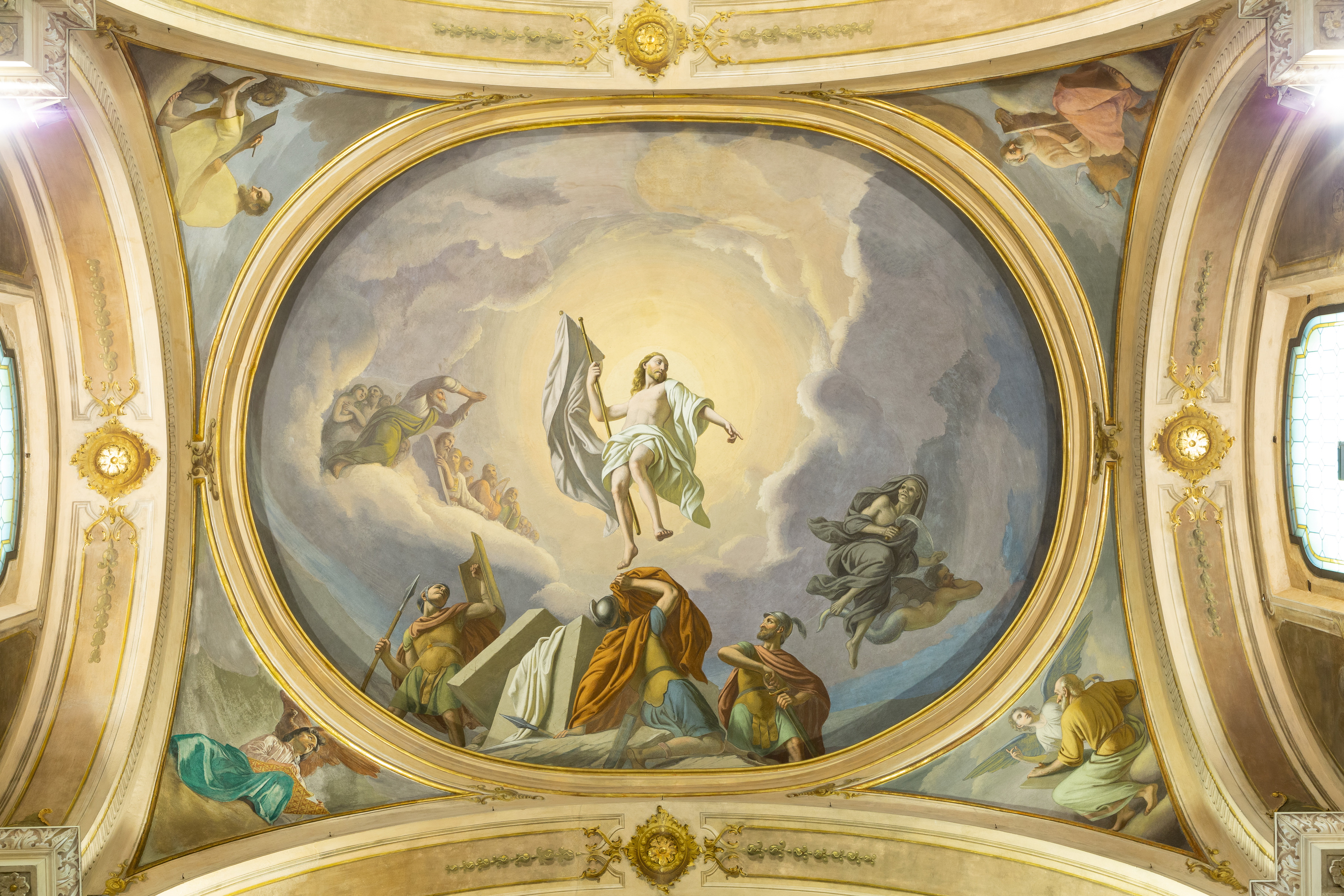 La Resurrezione, opera di Antonio Guadagnini. Chiesa di san Zenone a Passirano (BS)